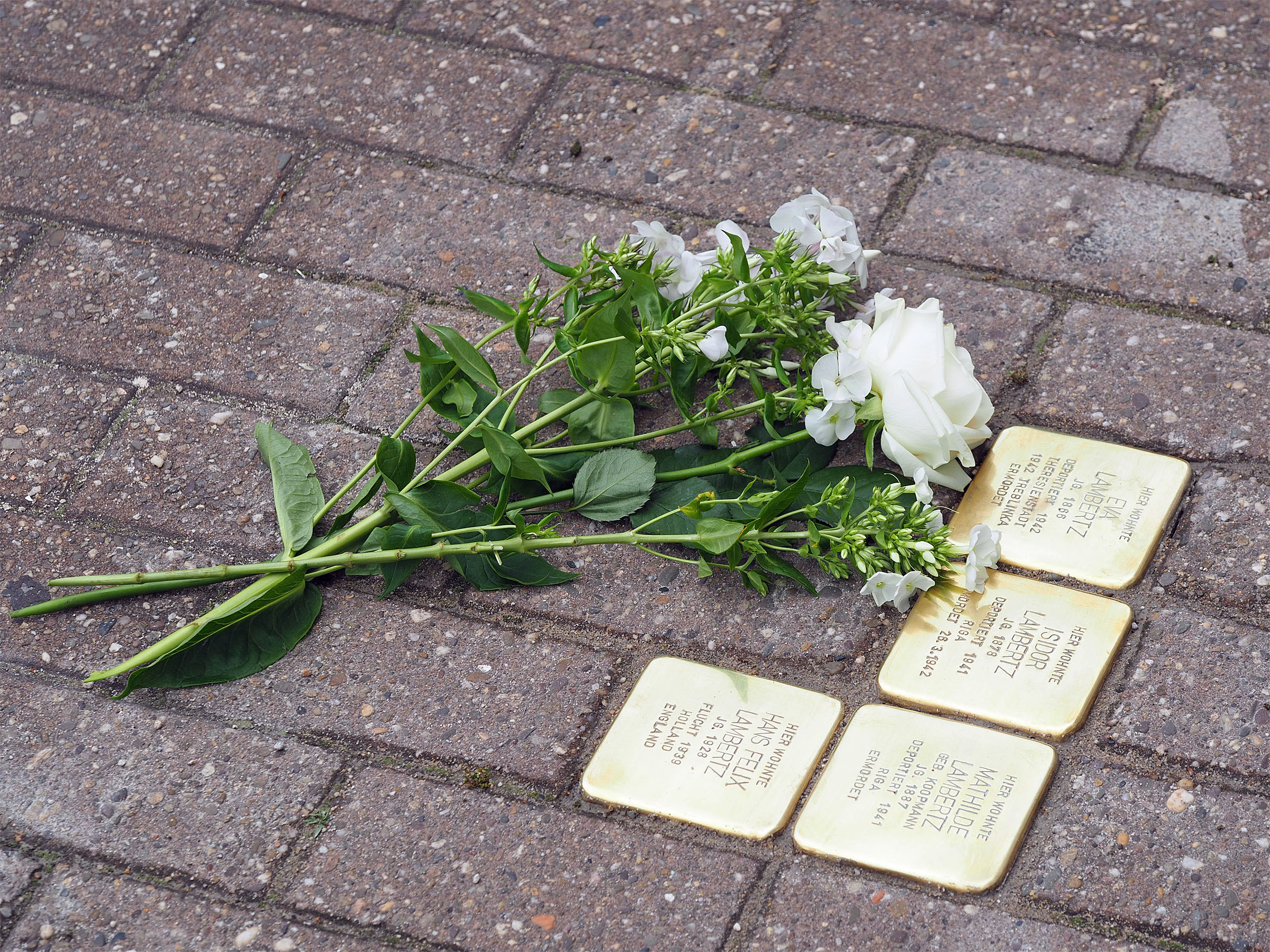 Stolpersteinverlegung in St. Hubert (Verlegung am 29. Mai 2018, Hauptstraße 43)